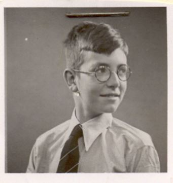 Einer der 14 deportierten und ermordeten jüdischen Schülerinnen und Schüler der Quäkerschule Eerde.